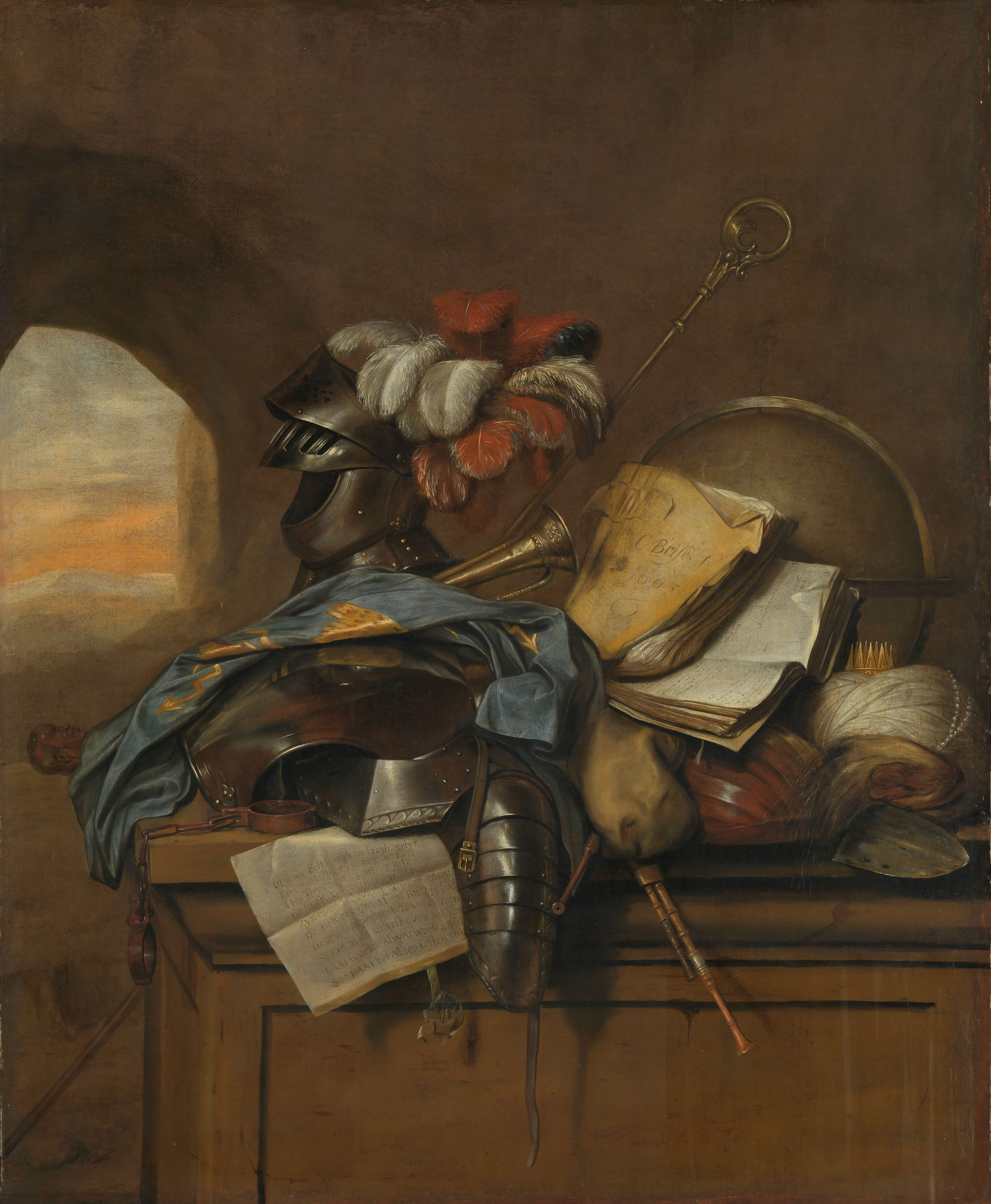 Vanitas stilleven. Stilleven met een helm met pluimen, een blad papier met een vers en een zegel, een kuras, boeken, een doedelzak en een trompet, handboeien, een vaandel, een bisschopsstaf, een schep, een tulband met een kroon en een globe.